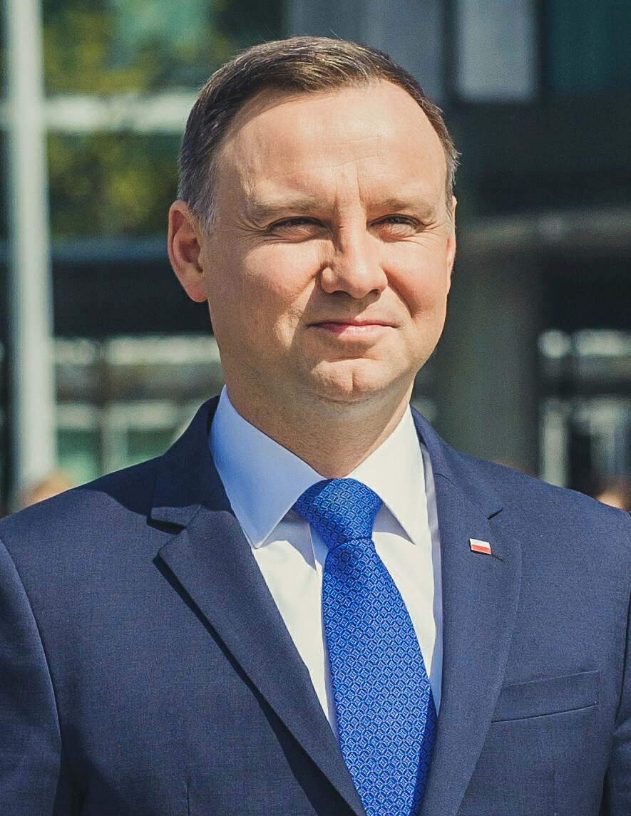 Prezydent RP Andrzej Duda